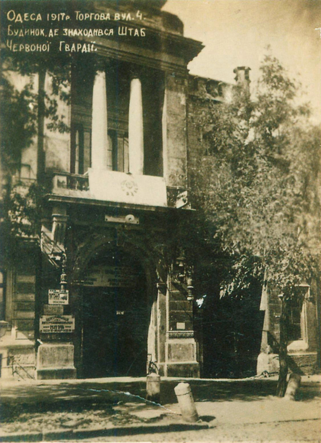 В'їздний портал картинної галереї О.П. Руссова, арх. Л.М. Чернігов, 1890 рр. Знищений у 1940-х роках, Торгова вул., 4